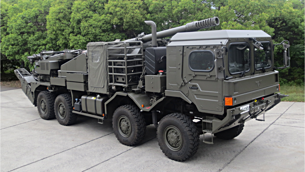 出典： 「装輪１５５ｍｍりゅう弾砲」防衛装備庁ホームページ（ （2019年5月5日に利用）